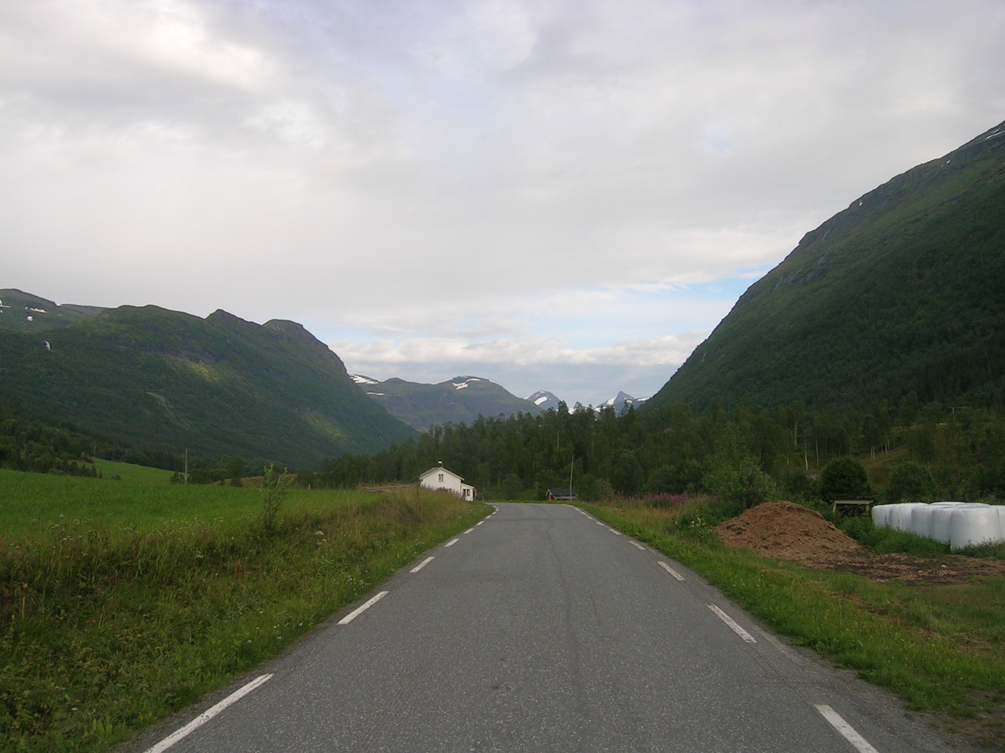 Leirskardalen, Nordland, Norway